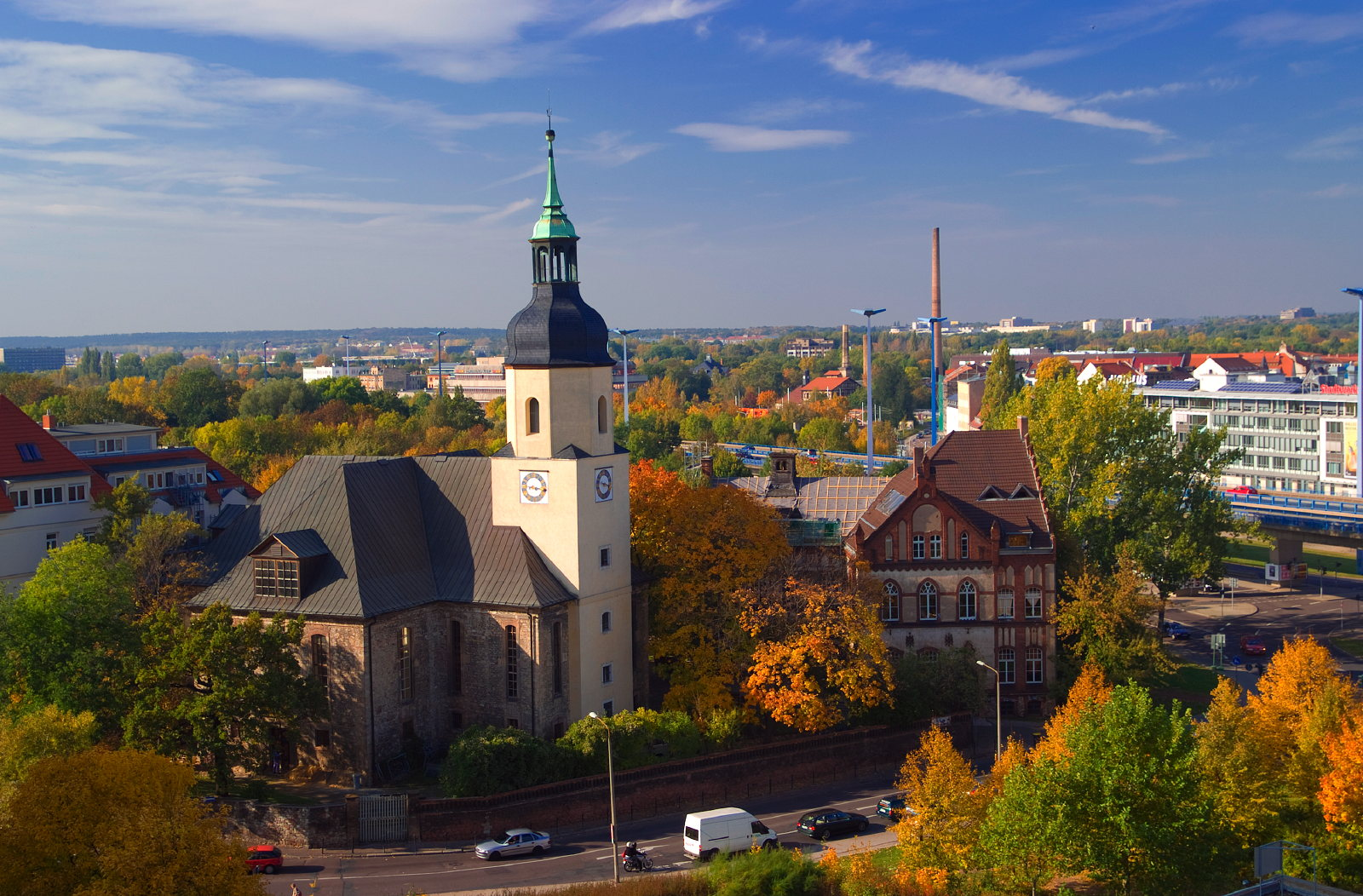 St. Georgenkirche in Halle